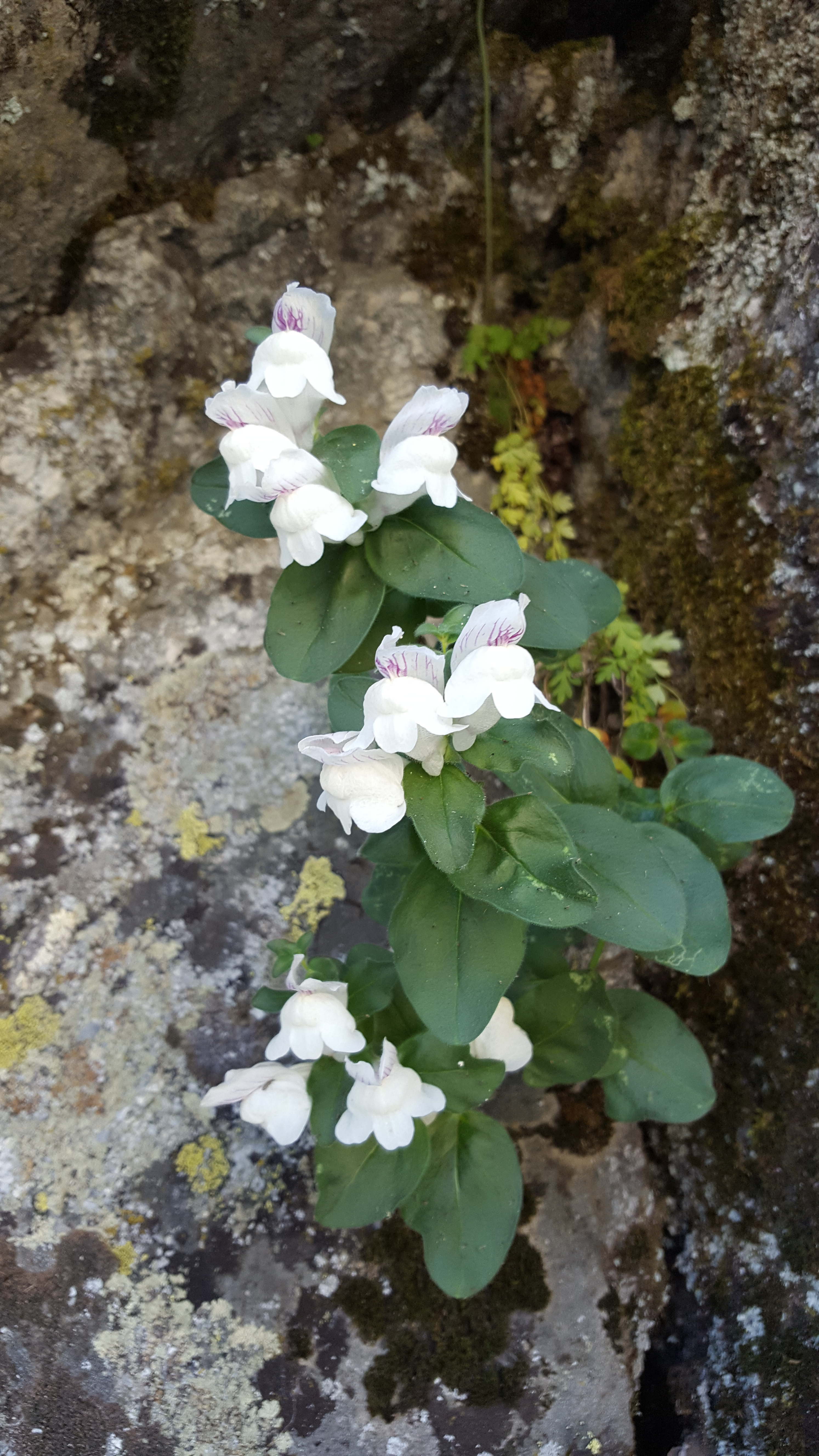 Boca de dragón en la Sierra de Gredos, Ávila, España